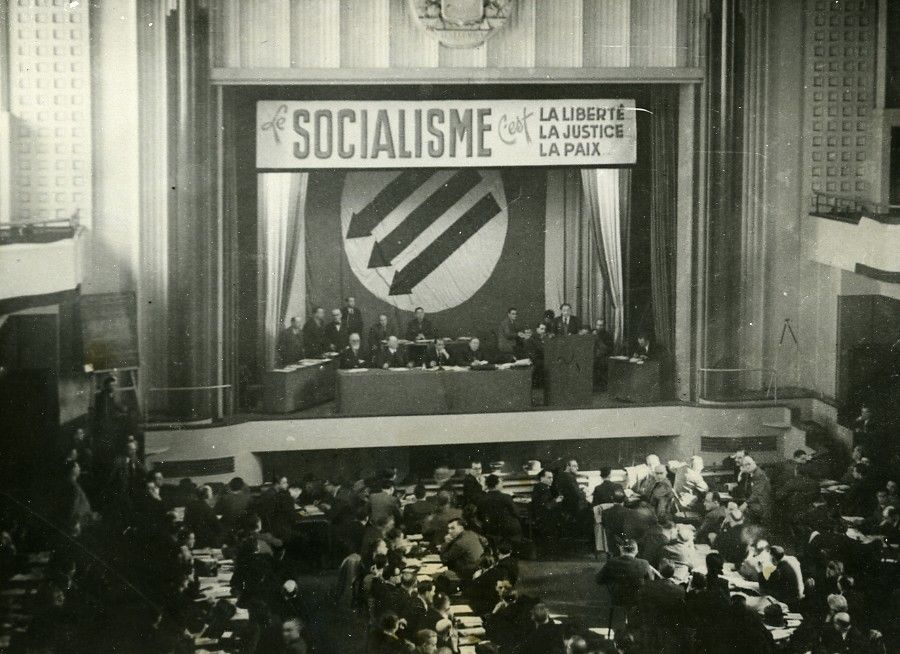 Congrès national extraordinaire de la SFIO tenu à Montrouge, les 29-31 mars 1946. Photo : NEWS SERVICE.